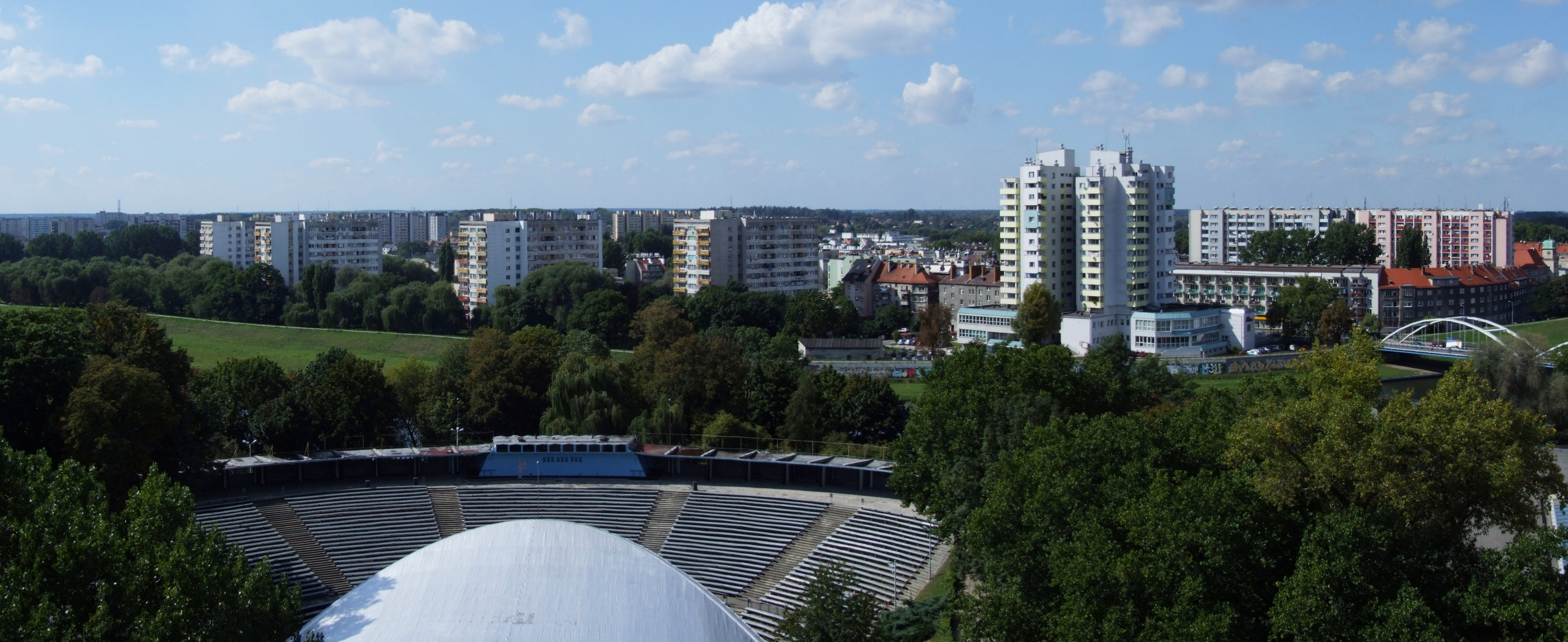 Dzielnica Zaodrze w Opolu - widok z Wieży Piastowskiej. Na pierwszym planie po lewej amfiteatr, po prawej Urząd Wojewódzki